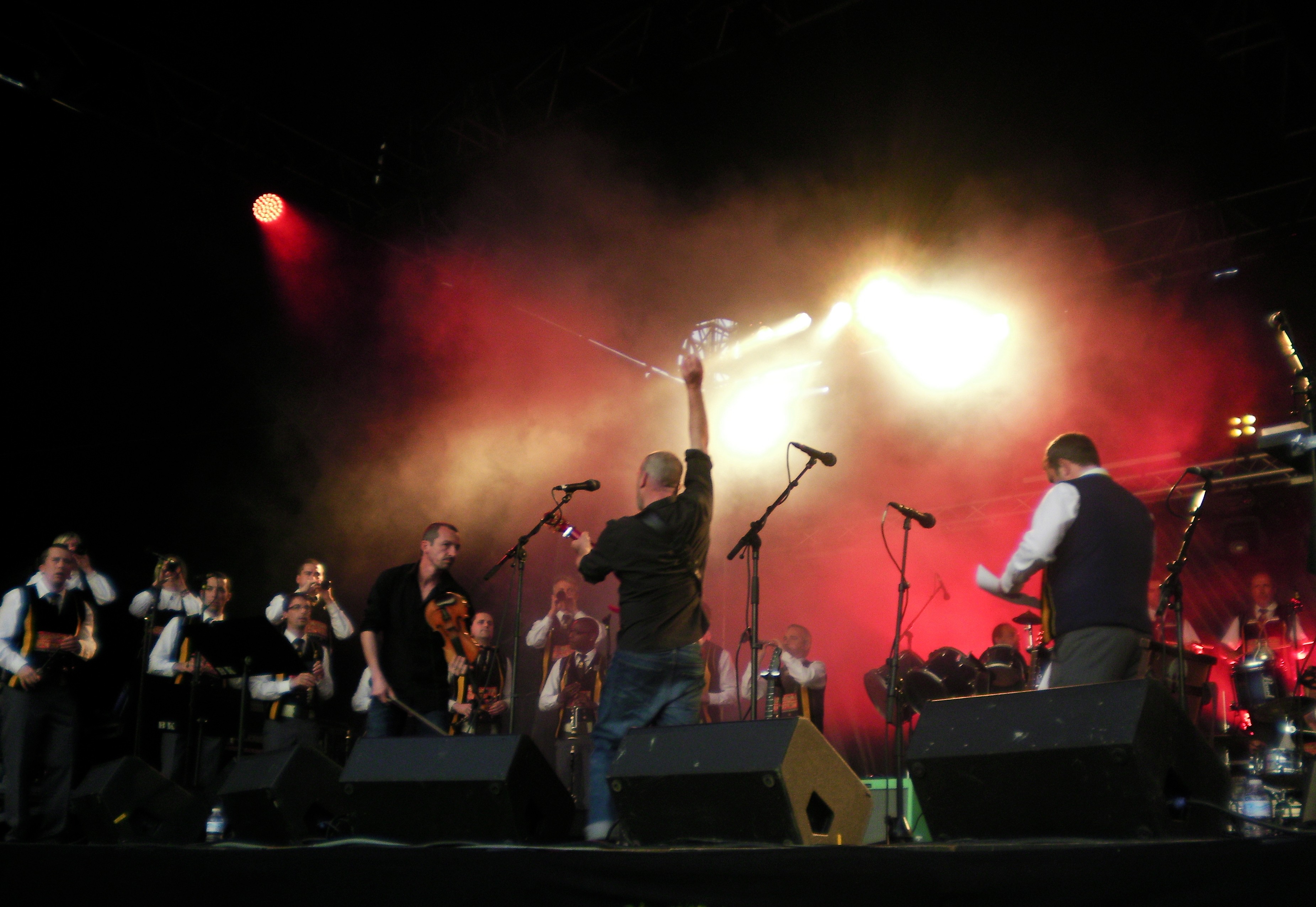 Spectacle Fest-Rock : le groupe Red Cardell et le bagad Kemper à Saint-Pol-de-Léon lors des fêtes folkloriques du Léon le 15 juillet 2012.